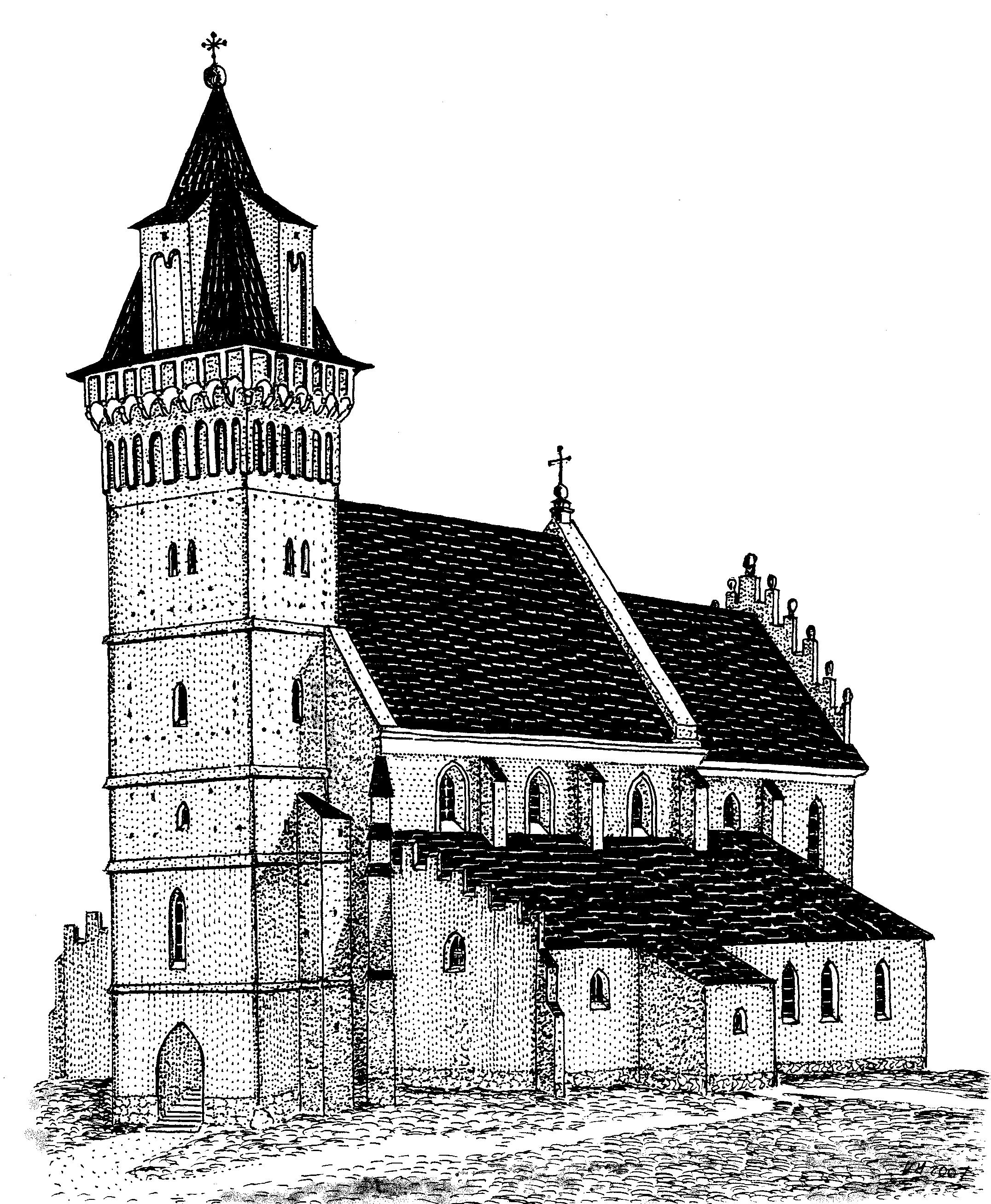 Kolegiata w Tarnowie w formie, jaką uzyskała pod koniec XV w. i posiadała do początku XIX w.